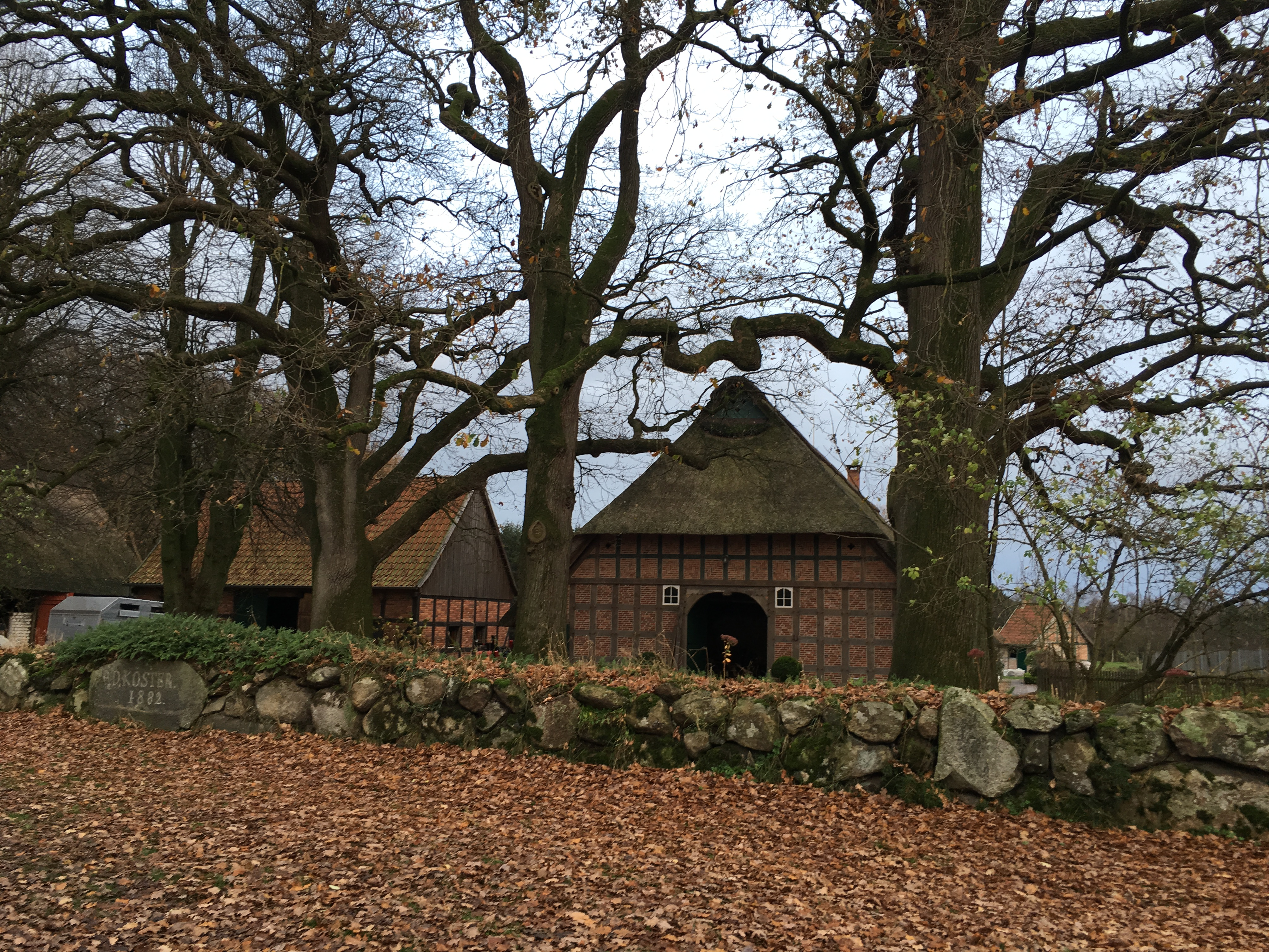 Hoff Köster in Oosterweed